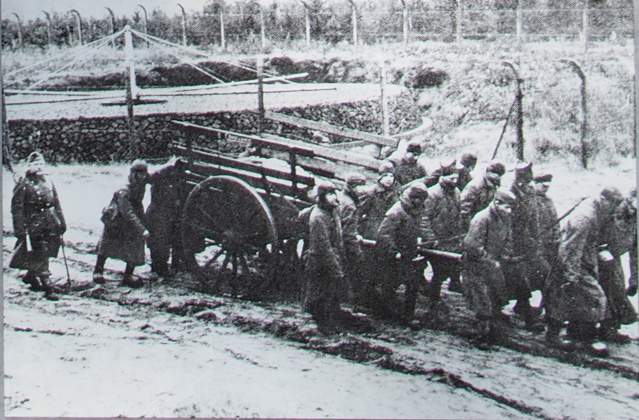 Öffentlich ausgestelltes Bild auf dem ehemalige Gelände des KZ Bergen-Belsen